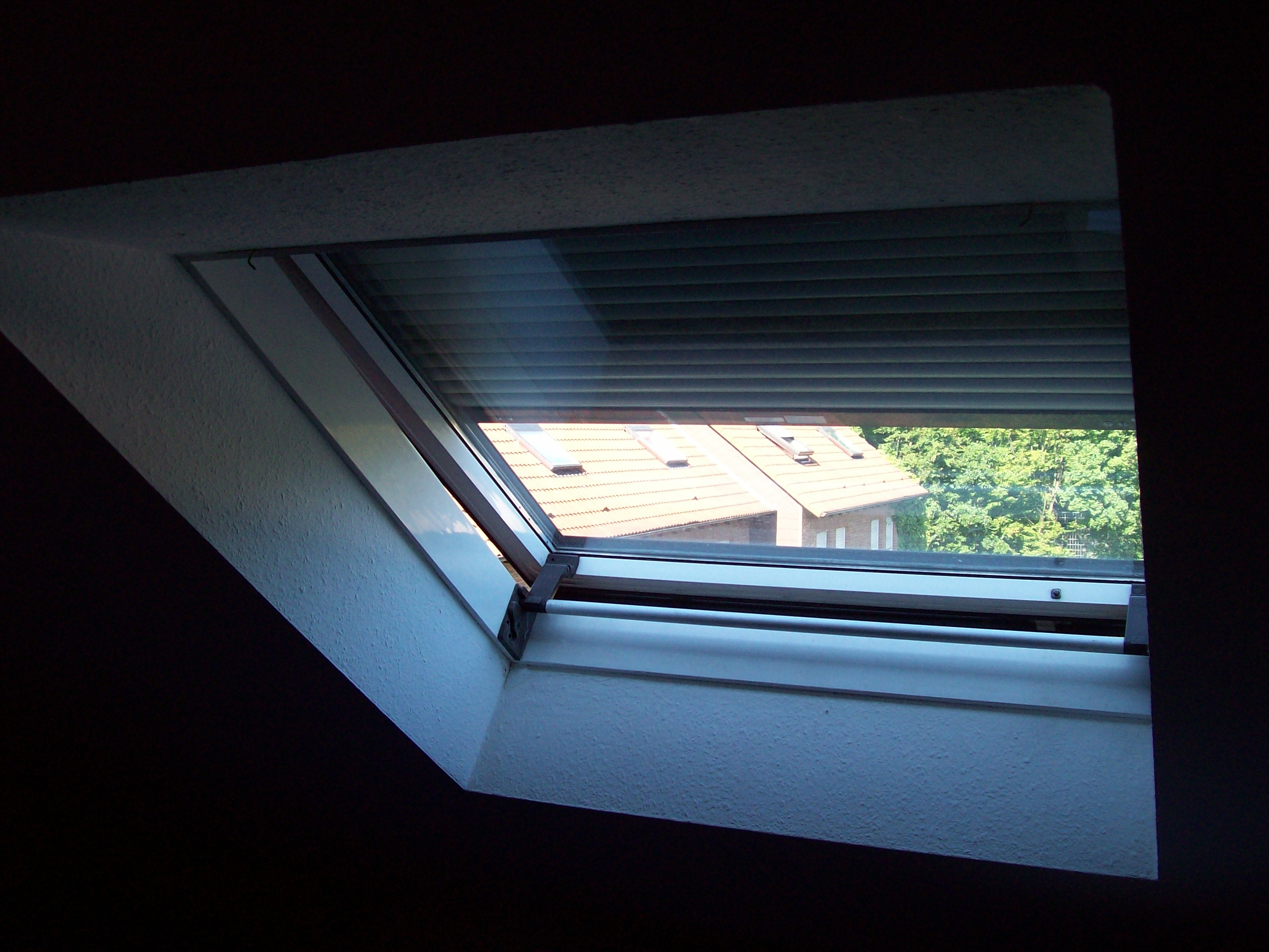 Rollade eines Dachfensters